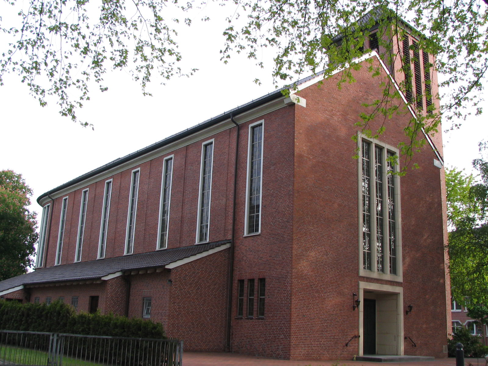 St. Marien, Leer-Loga, Ostfriesland, Deutschland